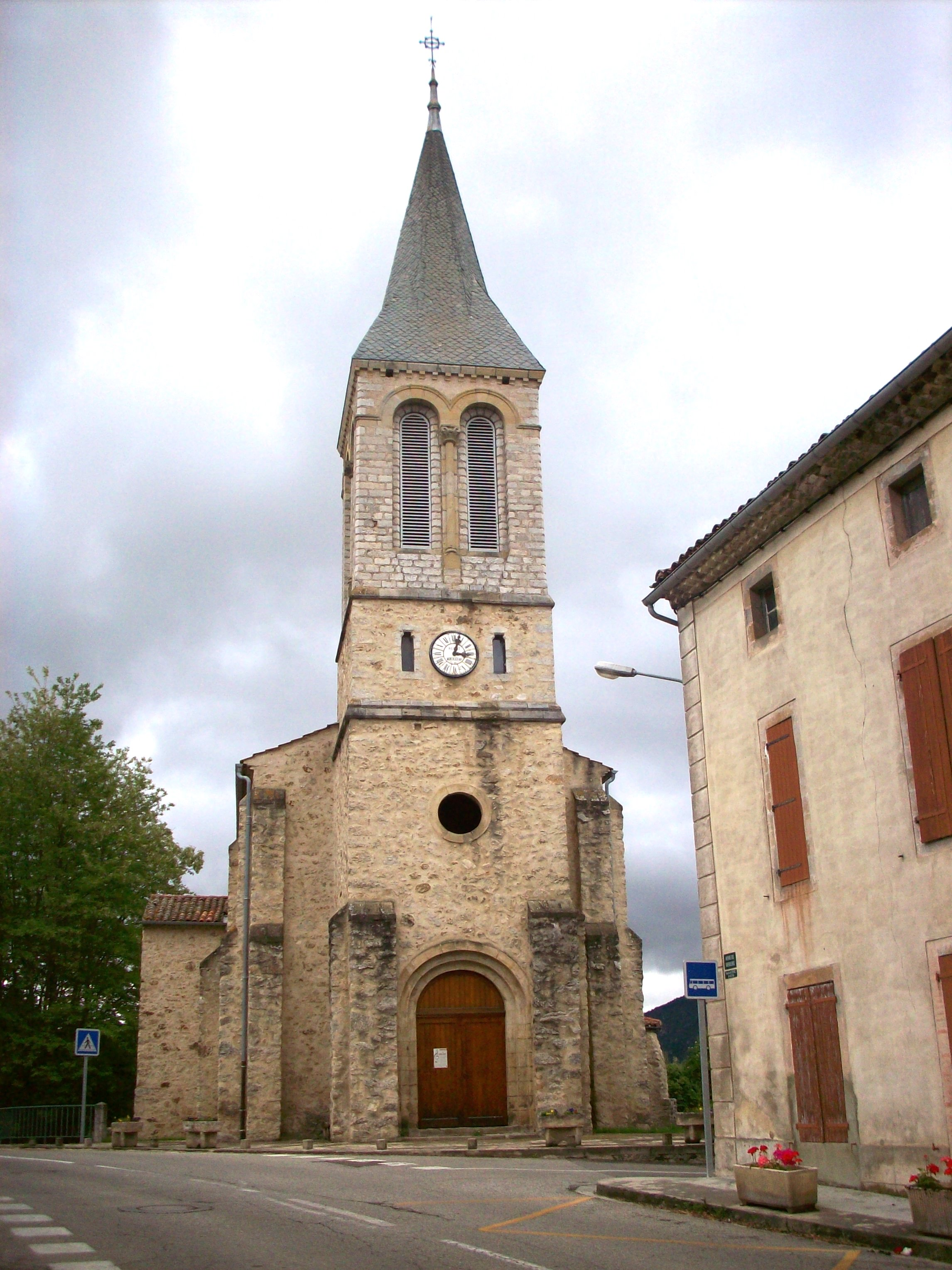 Église Notre-Dame-de-l'Assomption de Prayols (Ariège, France).